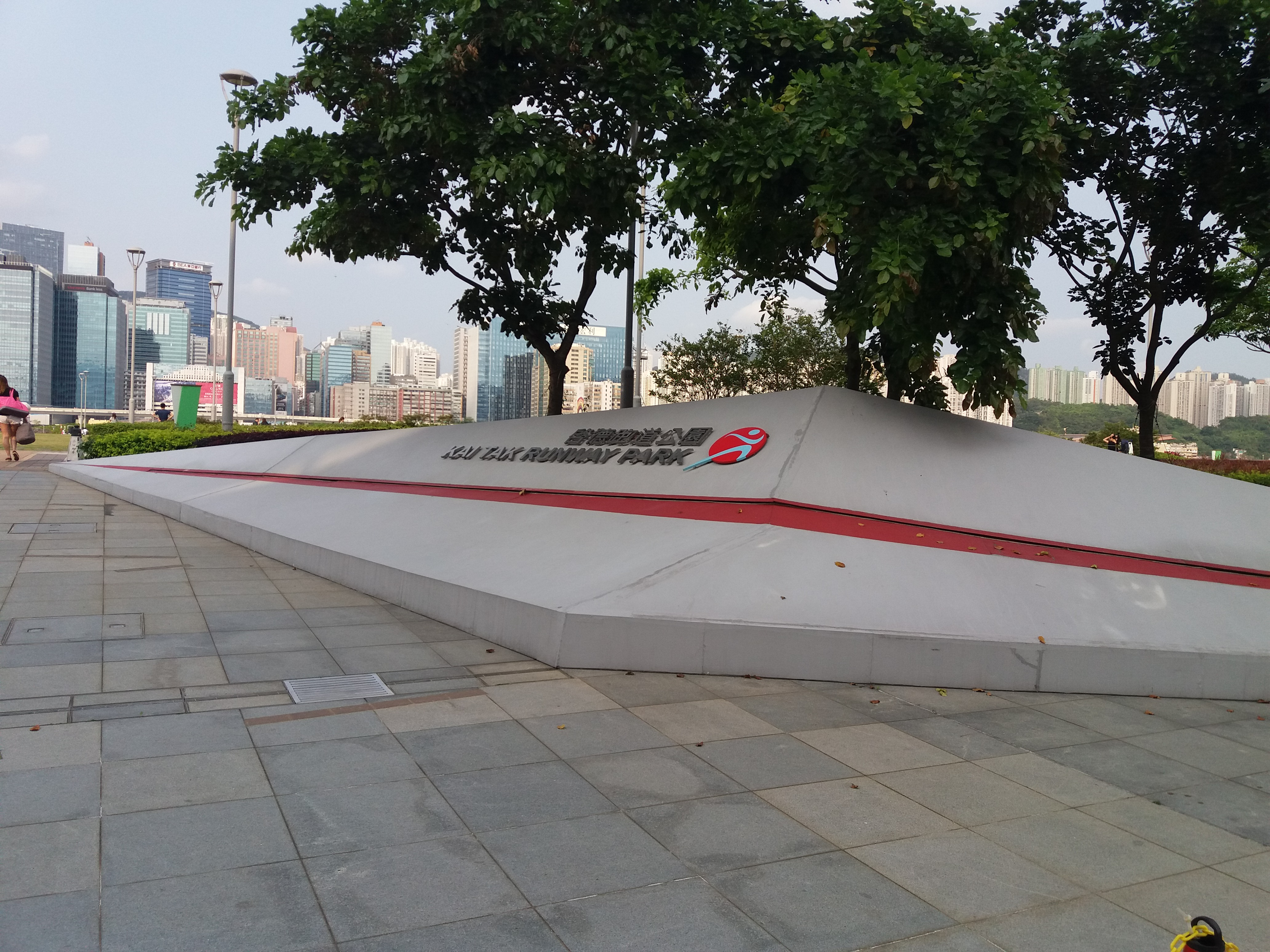 中文（香港）: 啟德跑道公園入口